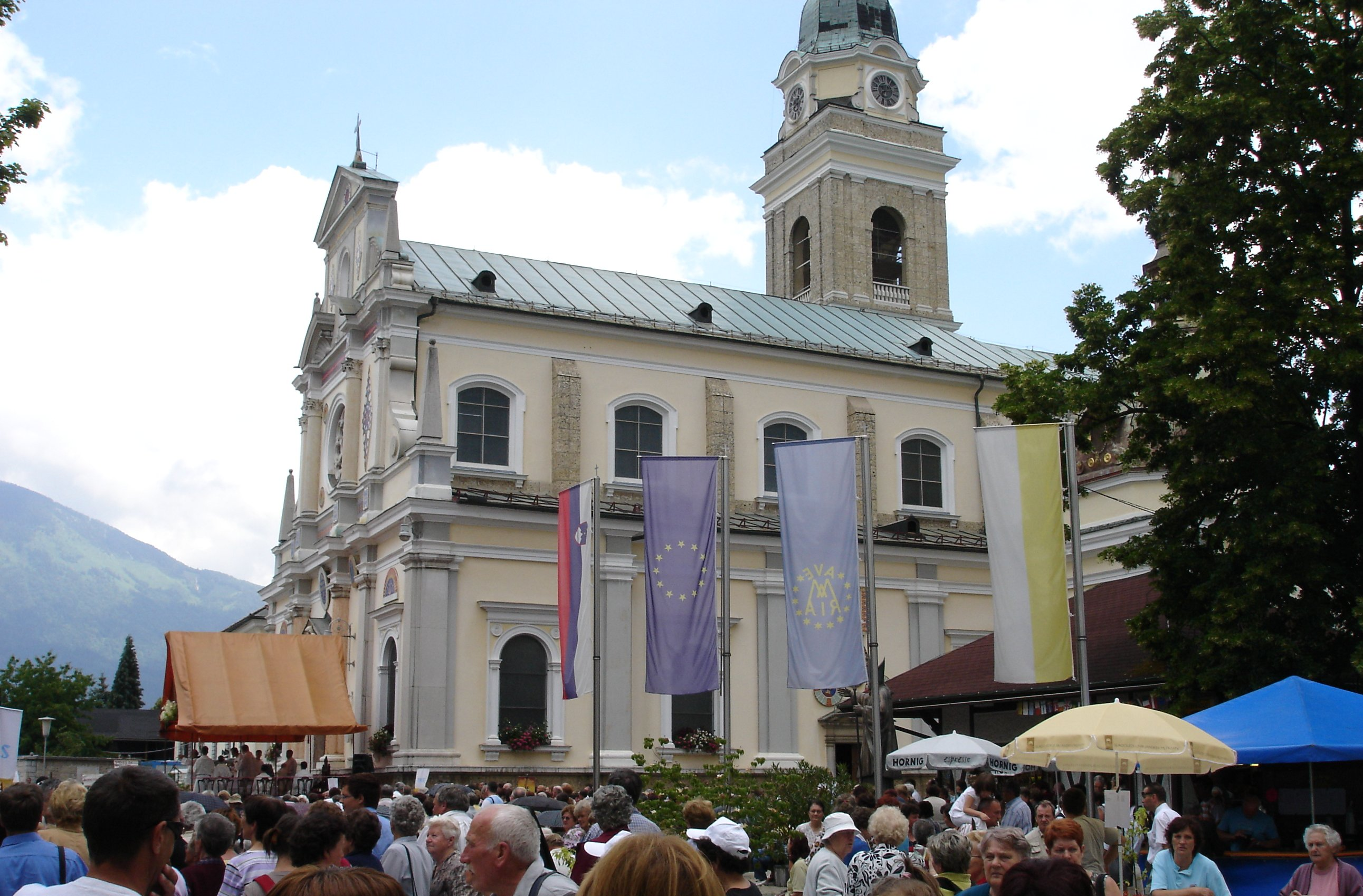 Brezjanska cerkev od zunaj